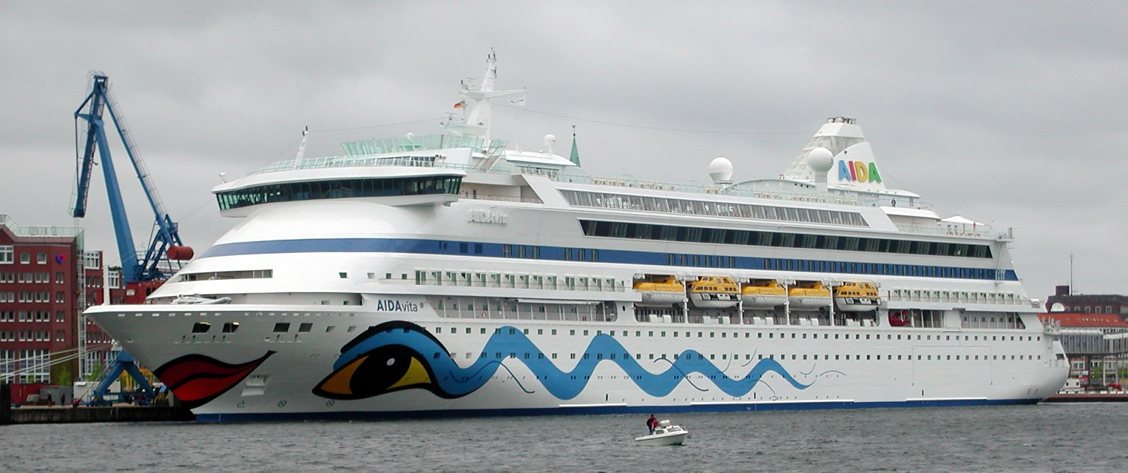 Kreuzfahrtschiff AIDAvita im Kieler Hafen (Seiten-Ansicht). IMO Number: 9221554 MMSI Number: 247114900 Callsign: IBNP Length: 202 m Beam: 28 m FORMER FLAGS since 2004 Nov 04 U.K.